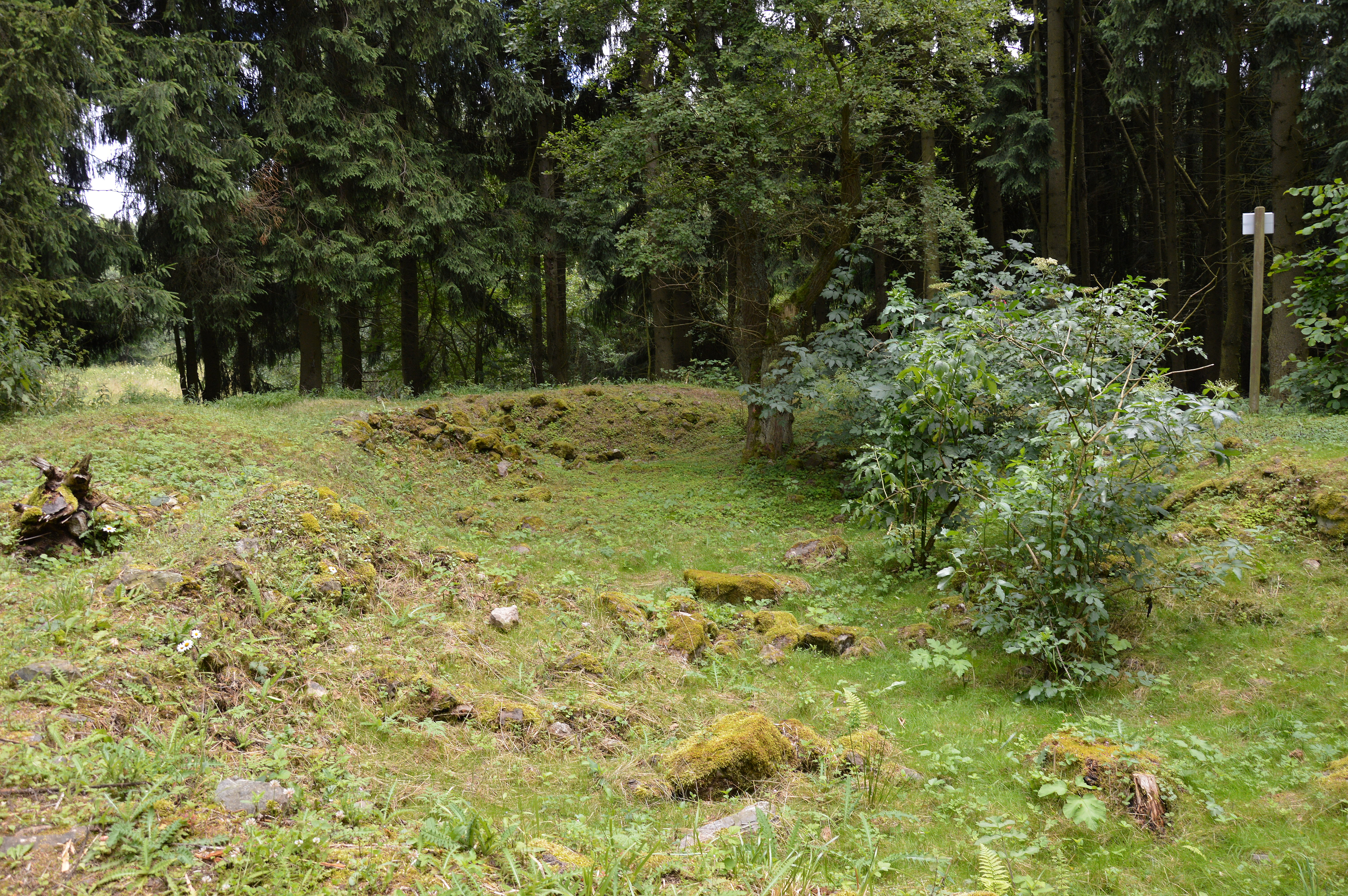 Selkirche 2017